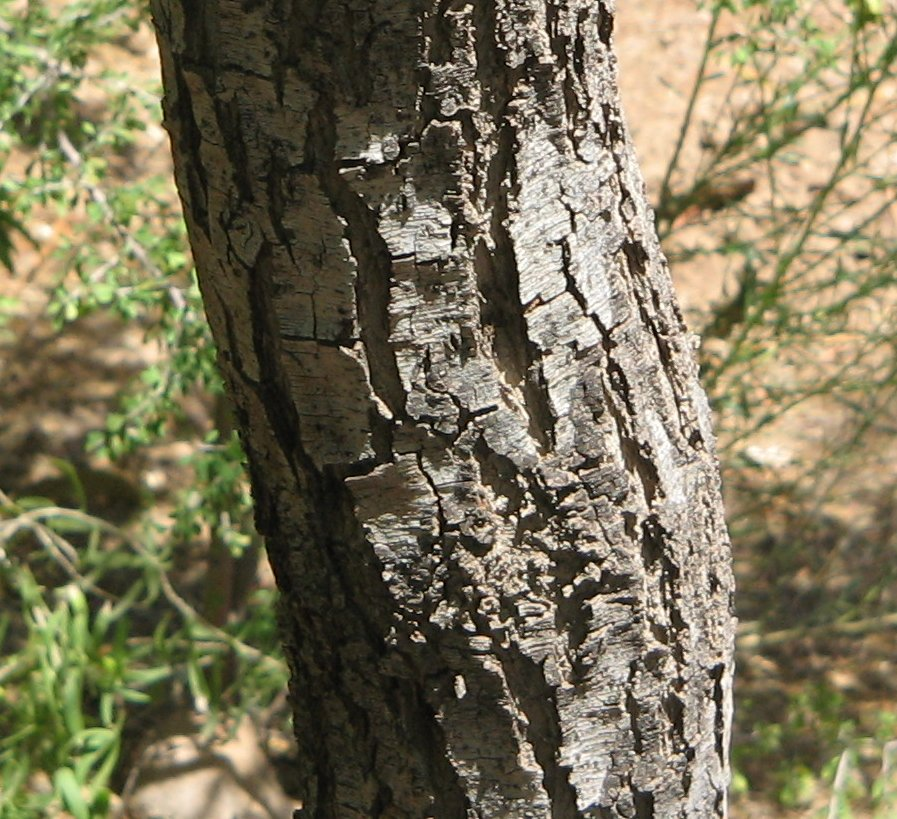 Acacia estrophiolata Bark Phoenix Desert Botanical Gardens